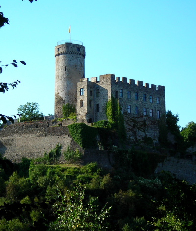 Ansicht der Burg Pyrmont in 2009